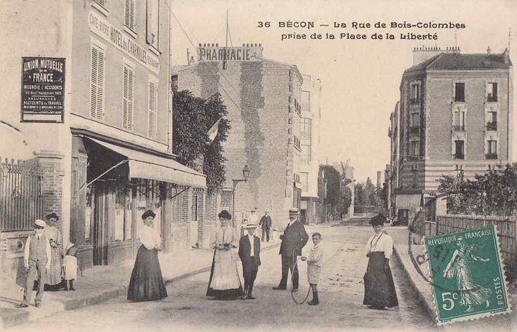 Courbevoie. Rue de Bois-Colombes prise de la place de la Liberté. Rue Edith-Cavell vers le sud